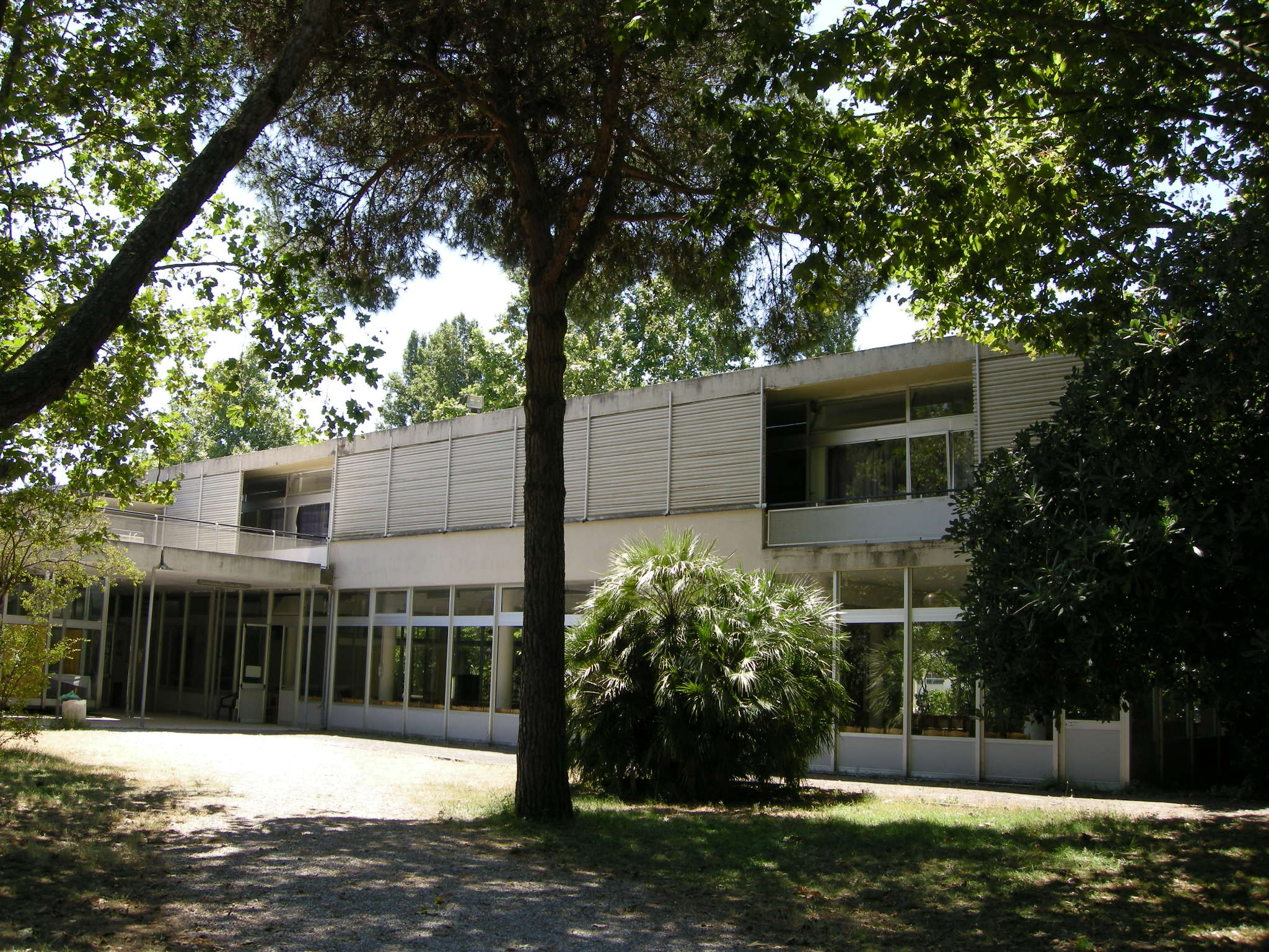 Colonia olivetti